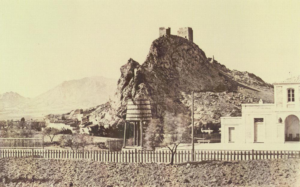 Fotografia de l'estació i castell de Saix (Alt Vinalopó), de Jean Laurent(1816 - 1886).